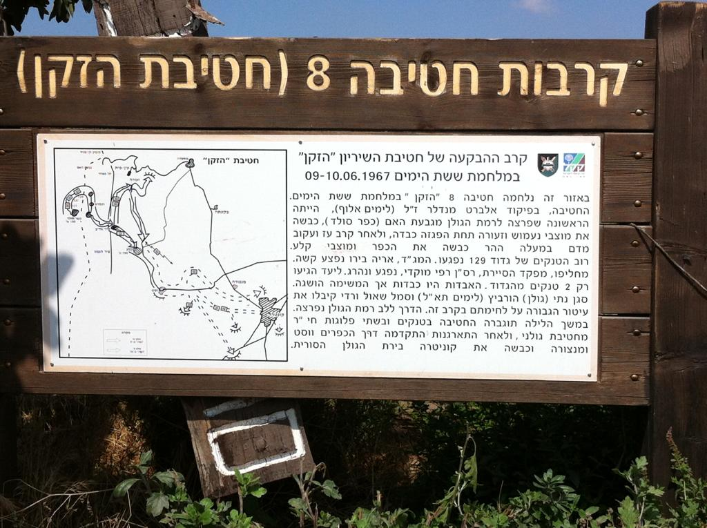 שלט קק"ל על קרבות חטיבת הזקן במלחמת ששת הימים